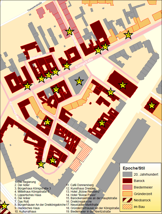 Bausubstanz und historische Gebäude im Dresdner Barockviertel Königstraße